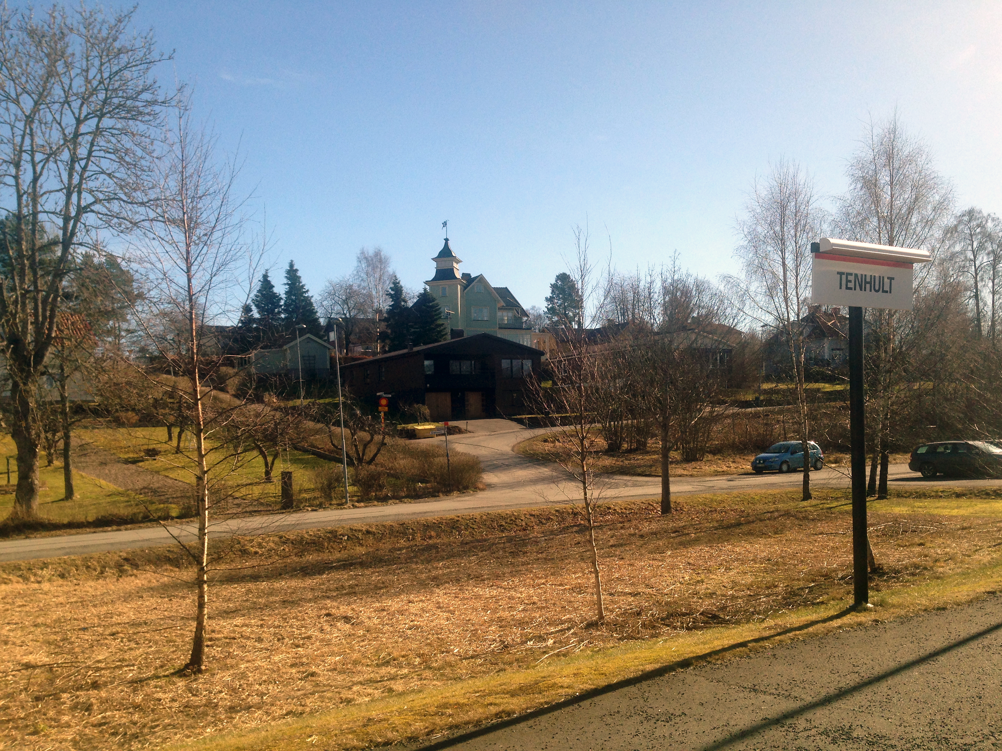 Tenhult